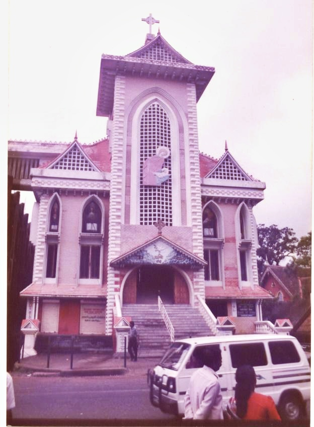 St. Mary Queen of Peace Syro-Malankara Pro-Cathedral Trivandrum, Kerala